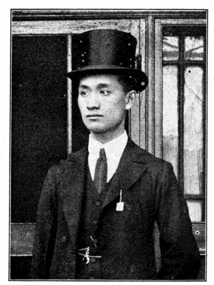 中文（台灣）: 中華民國國會議員